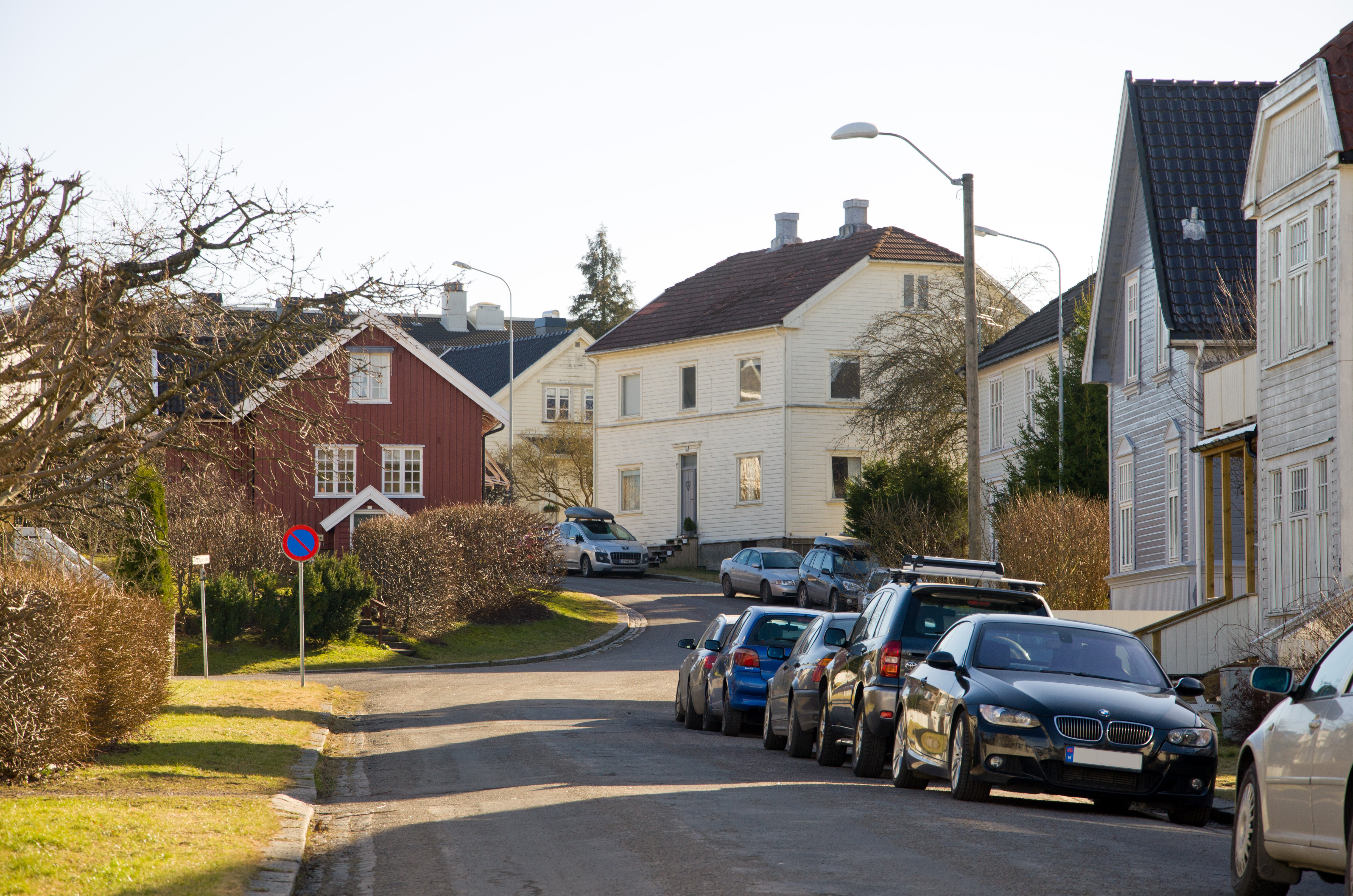 Kong Oscars gate, Tønsberg